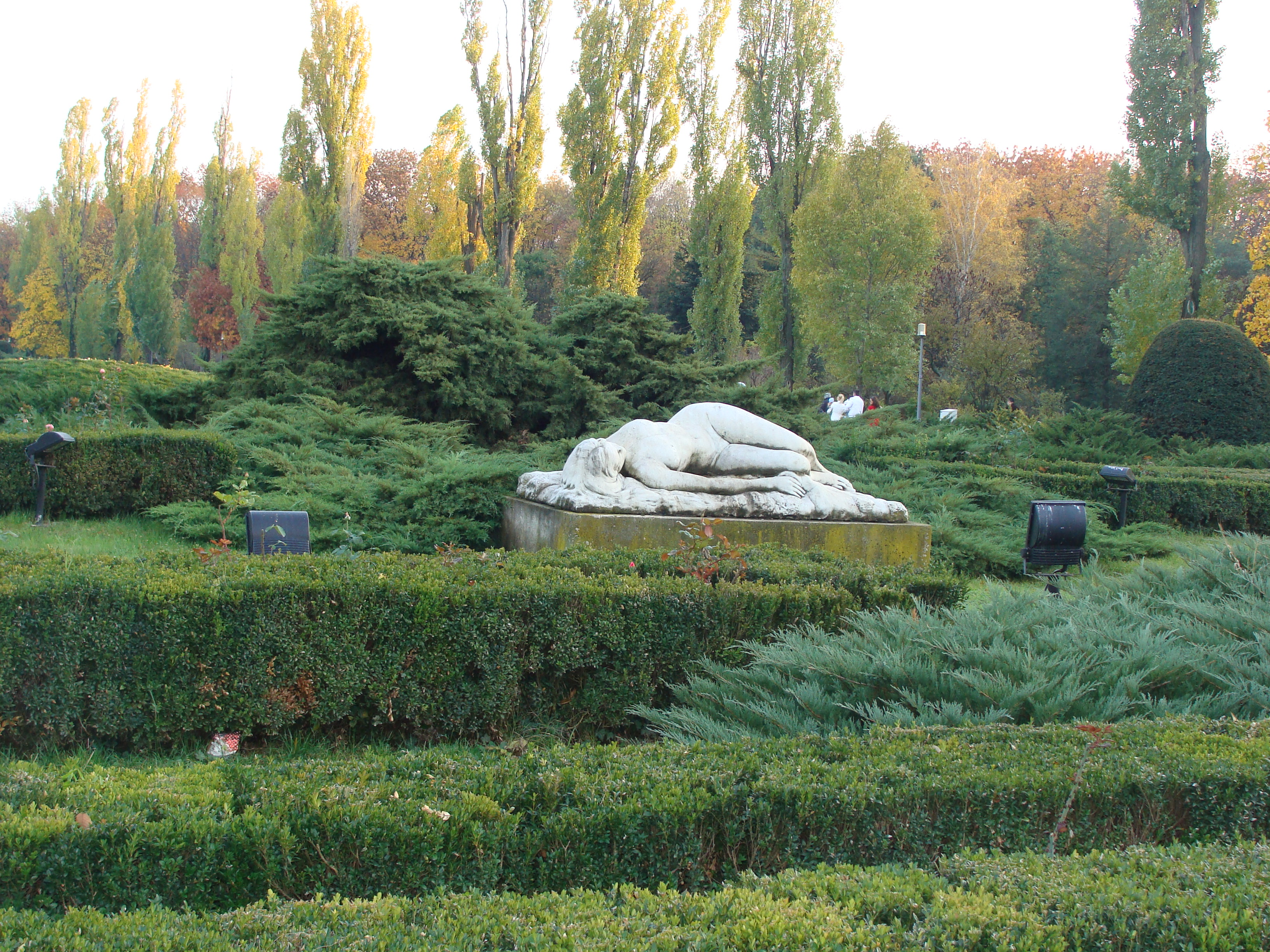 Nimfă adormită de Filip Marin expusă în Parcul Herăstrău din Bucureşti